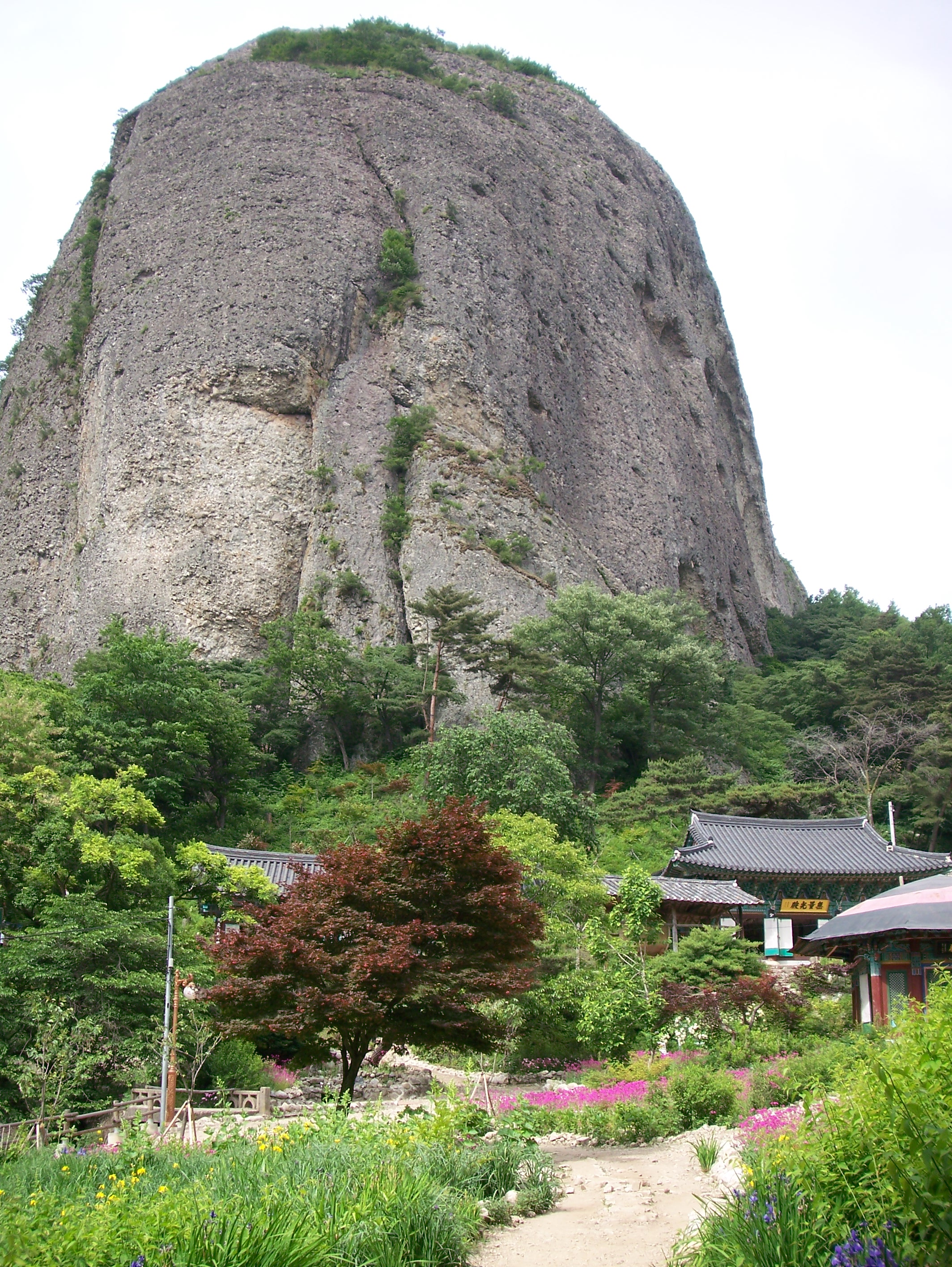 Maisan